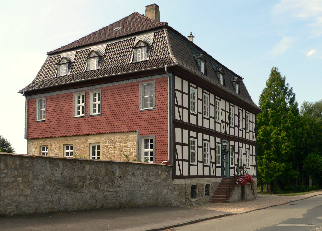 früheres Amtshaus in Oldershausen, erbaut 1781 vom königlichen und churfürstlichen Oberjägermeister Burchard Ahnton Friedrich von Oldershausen